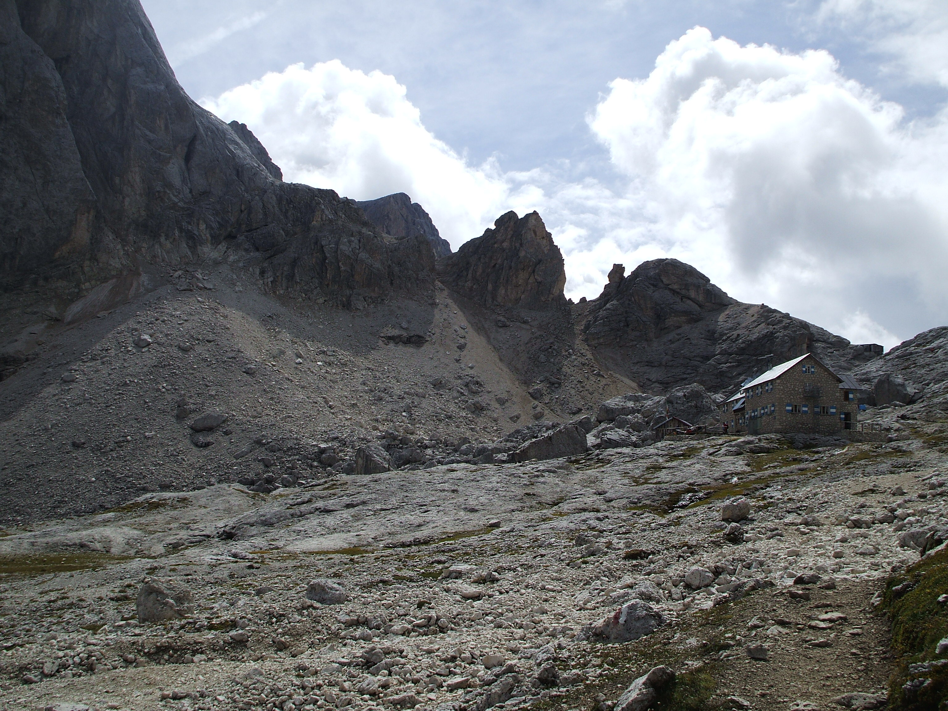 Sono l'autore della foto. Autore: Logudro. Data: 31/08/07.